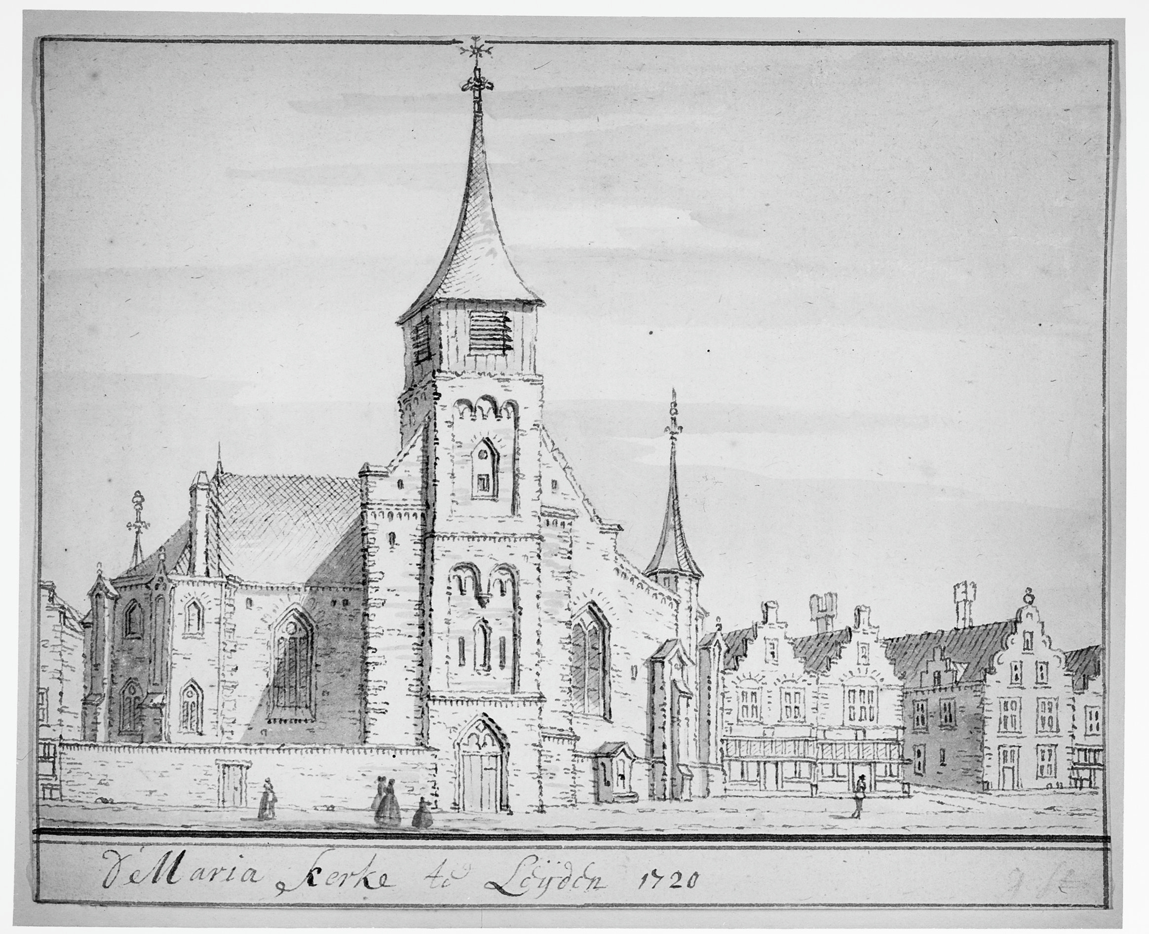 O.L.Vr. Kerk: kerk vanuit het westen naar tekening 1720, Gemeente archief Leiden